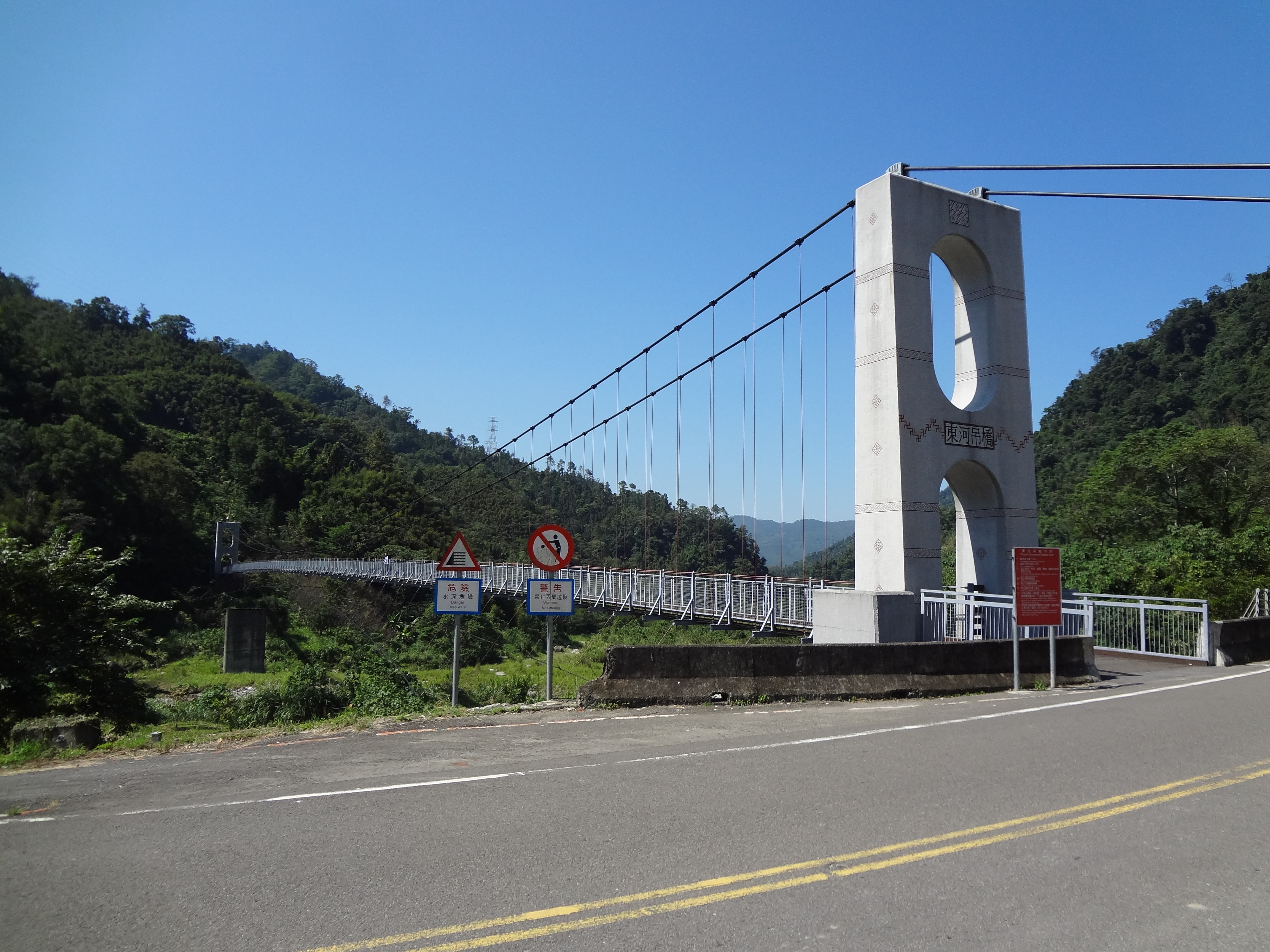 從苗栗縣南庄鄉苗21線望向東河吊橋。